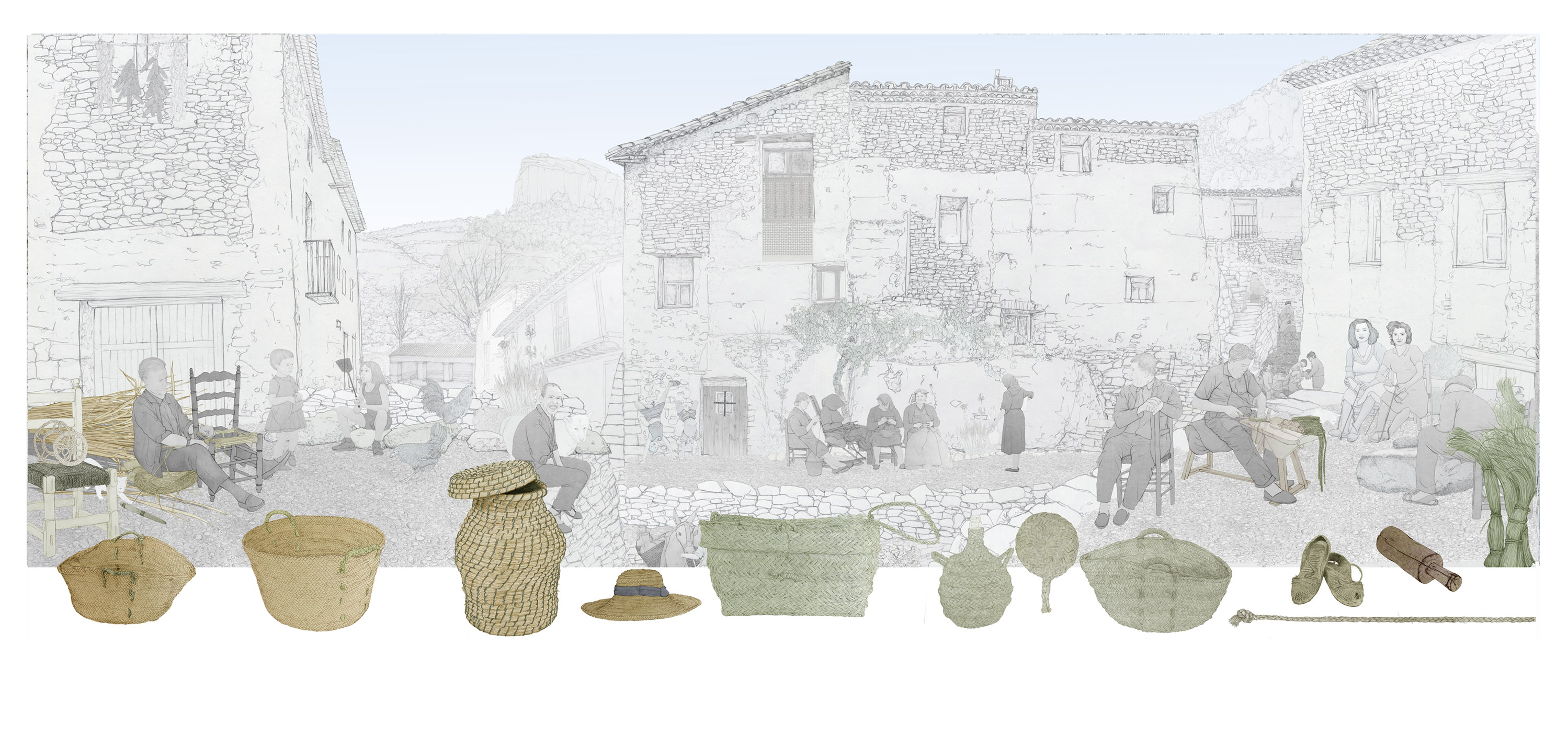 Il·lustracions d'Andrés Marín Jarque per a l'exposició permanent "Secà i Muntanya" del Museu Valencià d'Etnologia. S'il·lustren els escenaris del medi rural i el procés (treball) mitjançant el qual s'aprofita este espai.